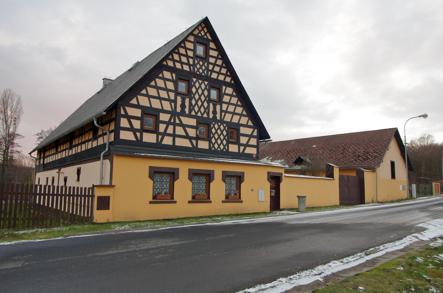 Venkovská usedlost (Královské Poříčí), Dlouhá 32, Královské Poříčí